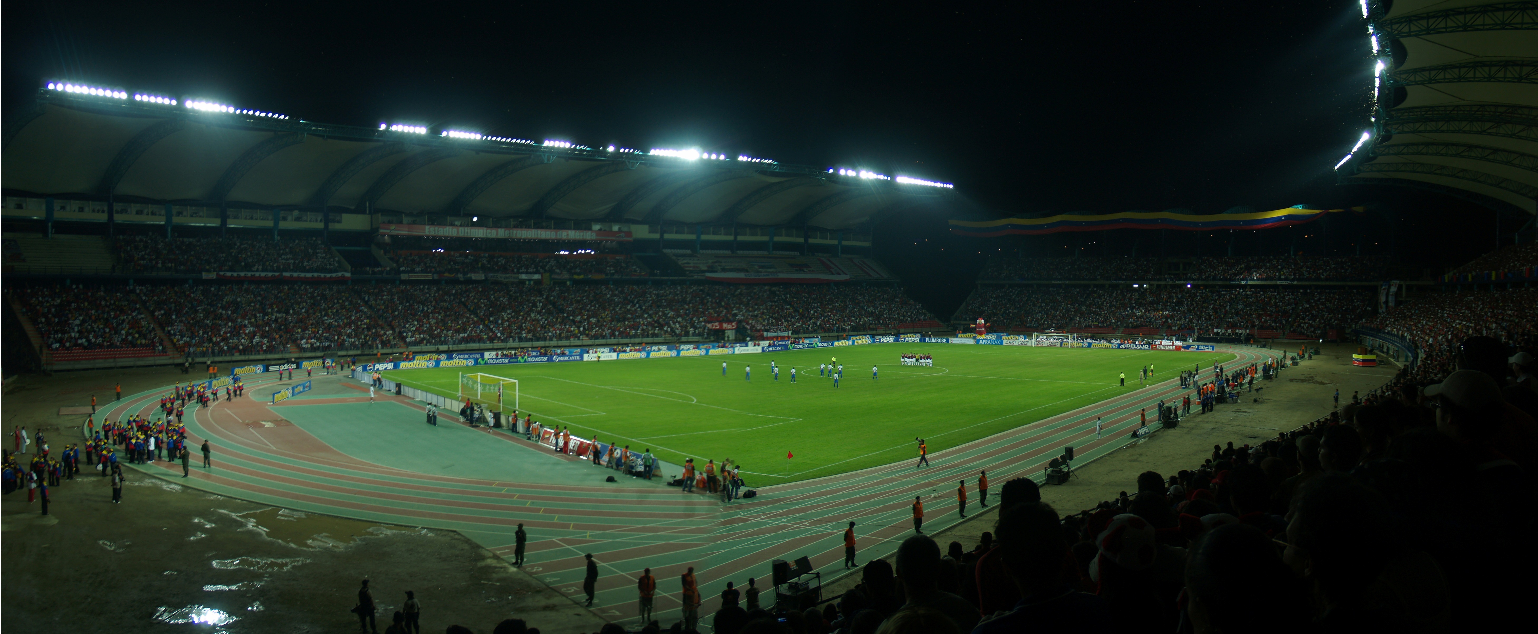 Panoramica interna del estadio Metropolitano de Merida durante el dia de su innauguracion en un partido amistoso entra la seleccion Vinotinto (Venezuela) y la seleccion de Honduras con resultado 2:1.